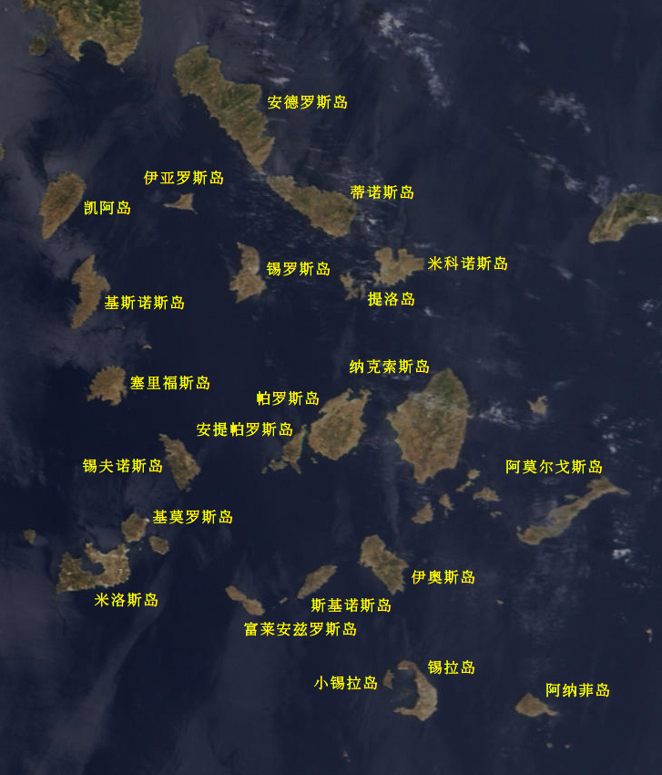 基克拉澤斯群島位置图